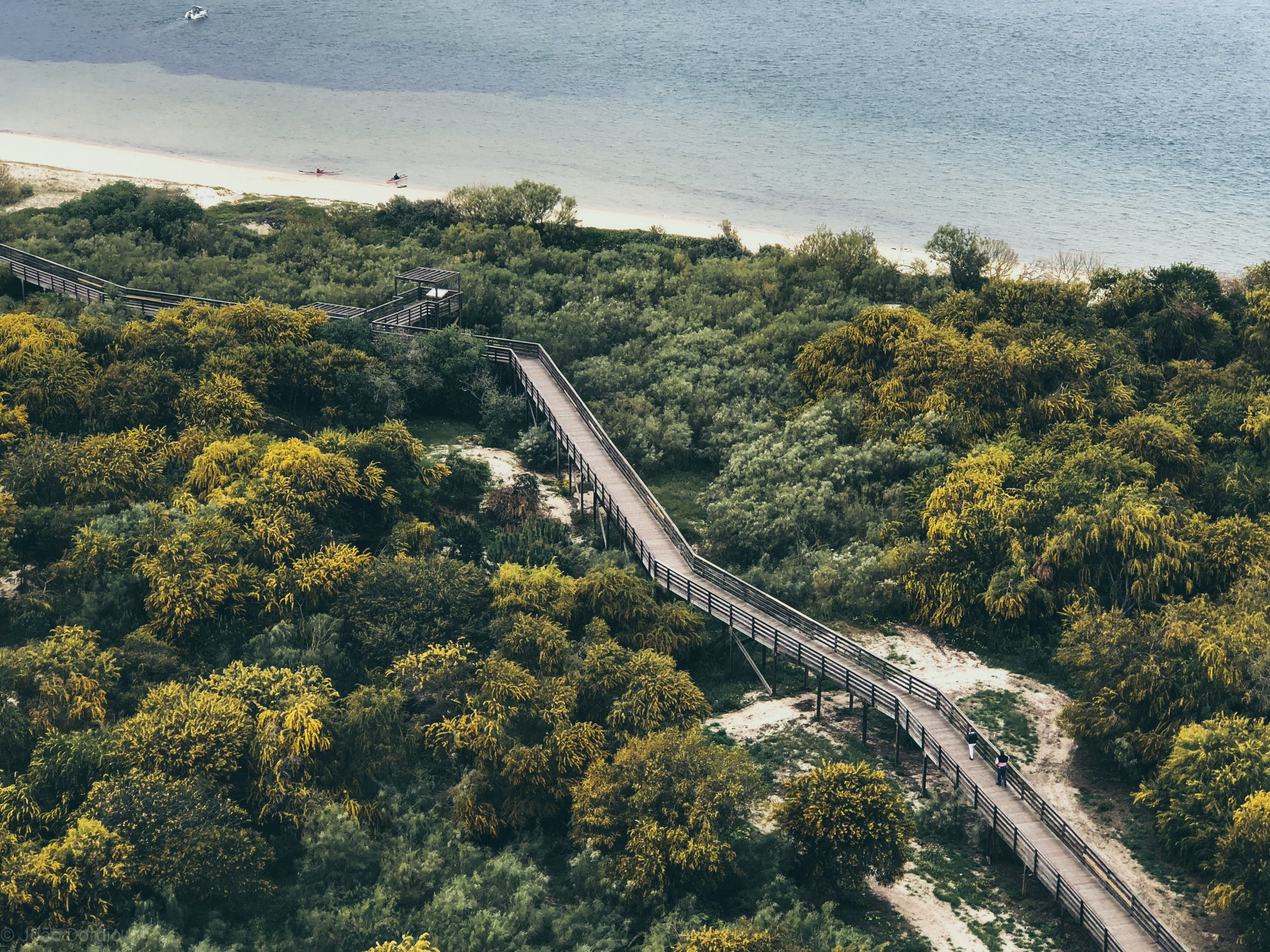 Troia-2018-picks-7